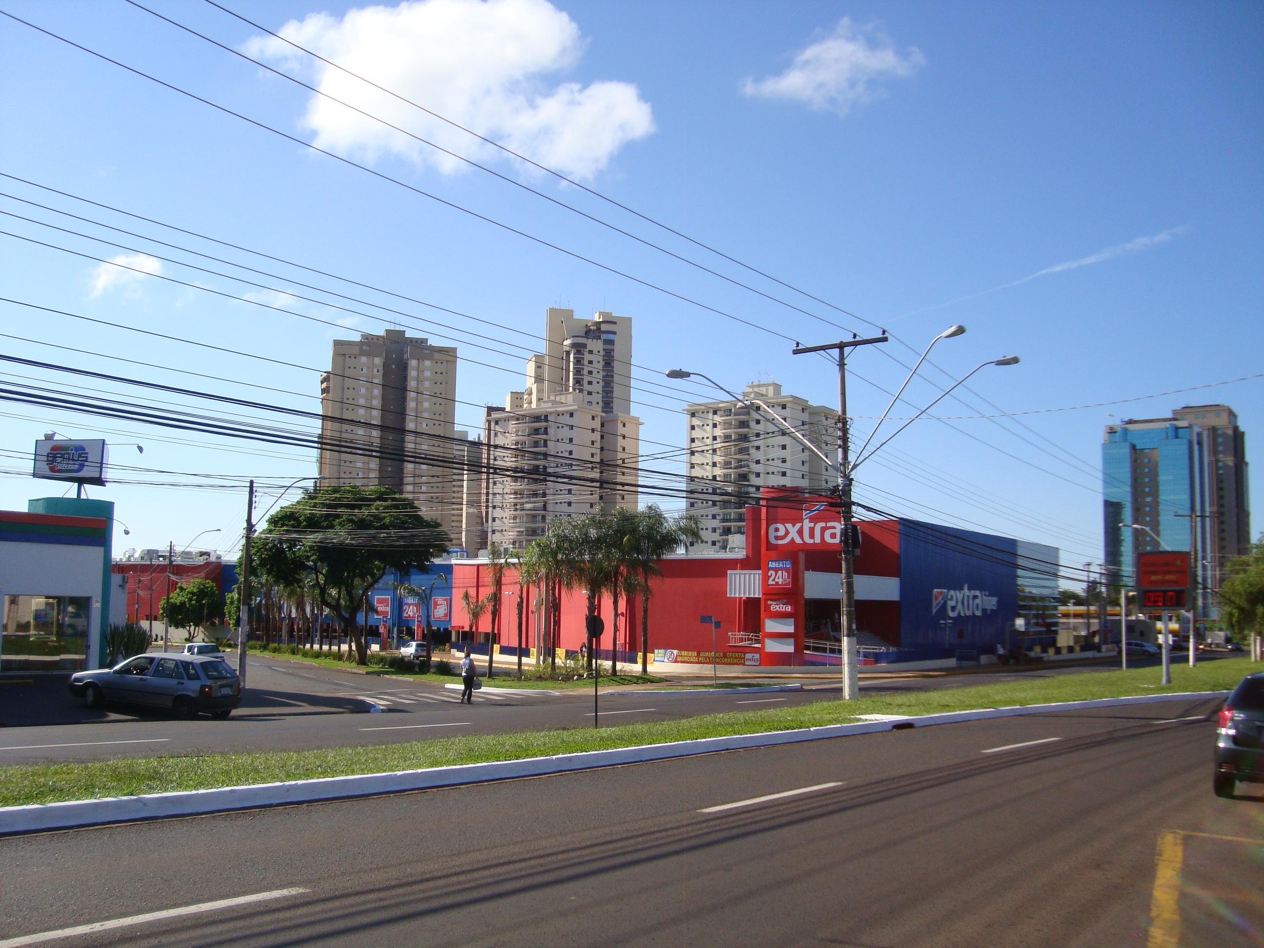 Hipermercado Extra Presidente Vargas